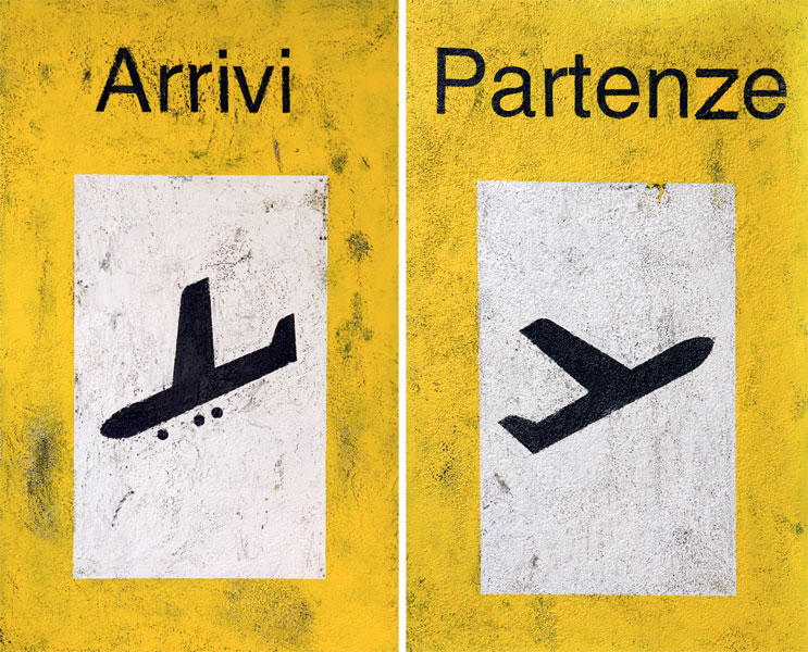 Asphalt Painting, Arrivi/Partenze, Michael Scheirl, 2006